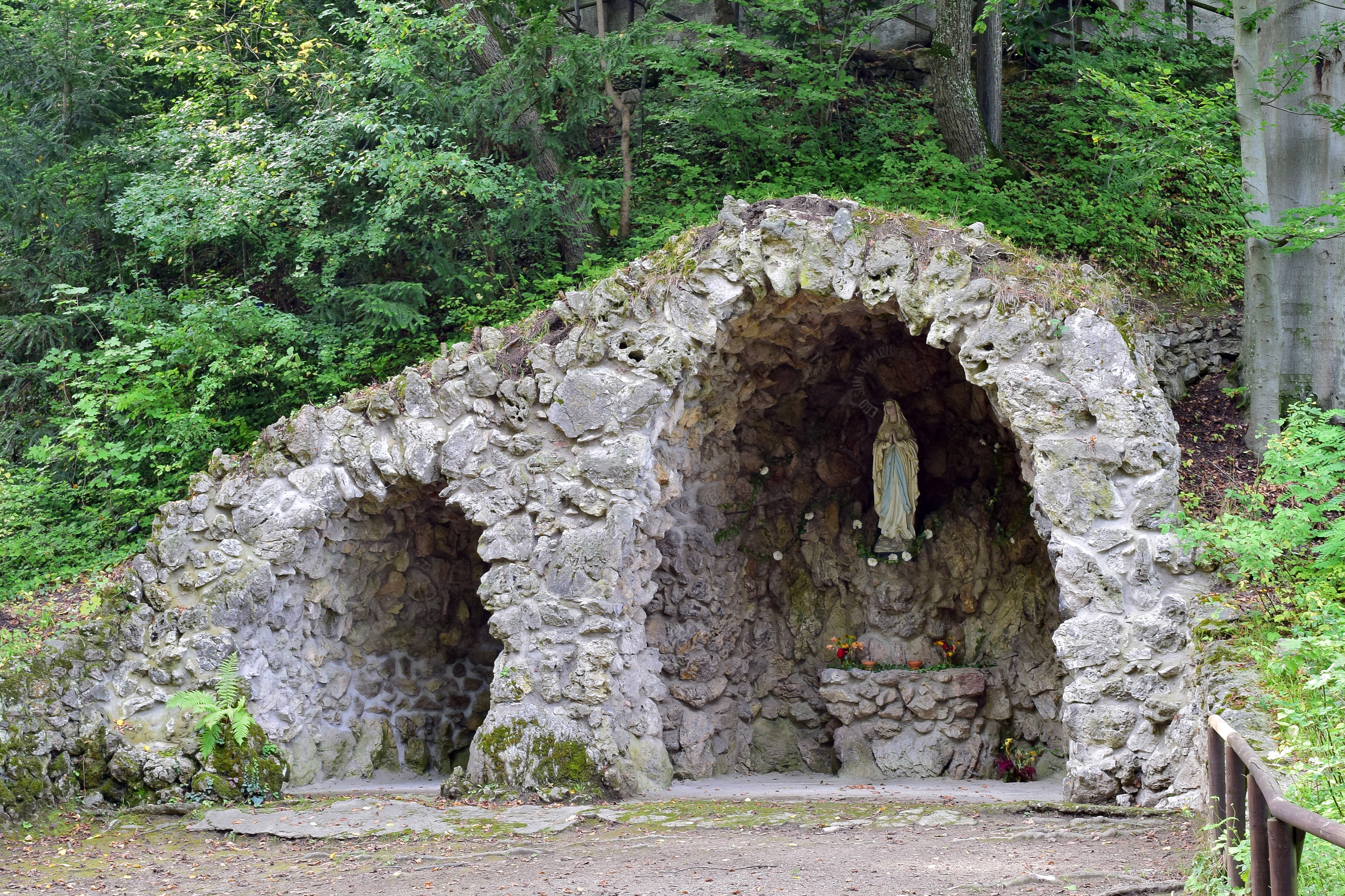 Lourdesgrotte im Park des Schlosses Rodaun